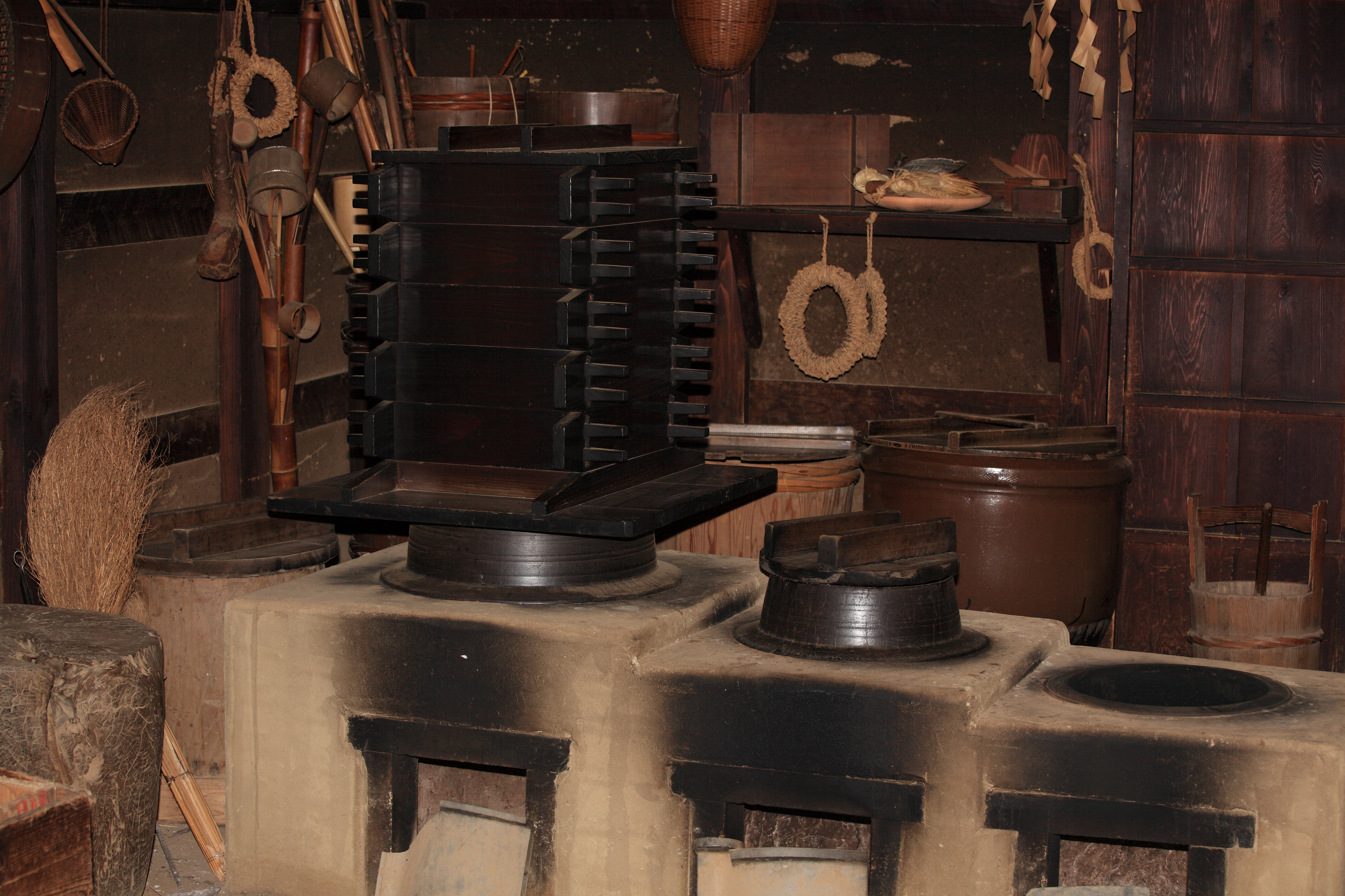 Boso-no-Mura Museum, Inba-gun(county) Chiba-ken(Prefecture), Japan %u5343%u8449%u770C%u5370%u65DB%u90E1(%u3061%u3070%u3051%u3093 %u3044%u3093%u3070%u3050%u3093) %u623F%u7DCF%u306E%u3080%u3089(%u307C%u3046%u305D%u3046%u306E%u3080%u3089)